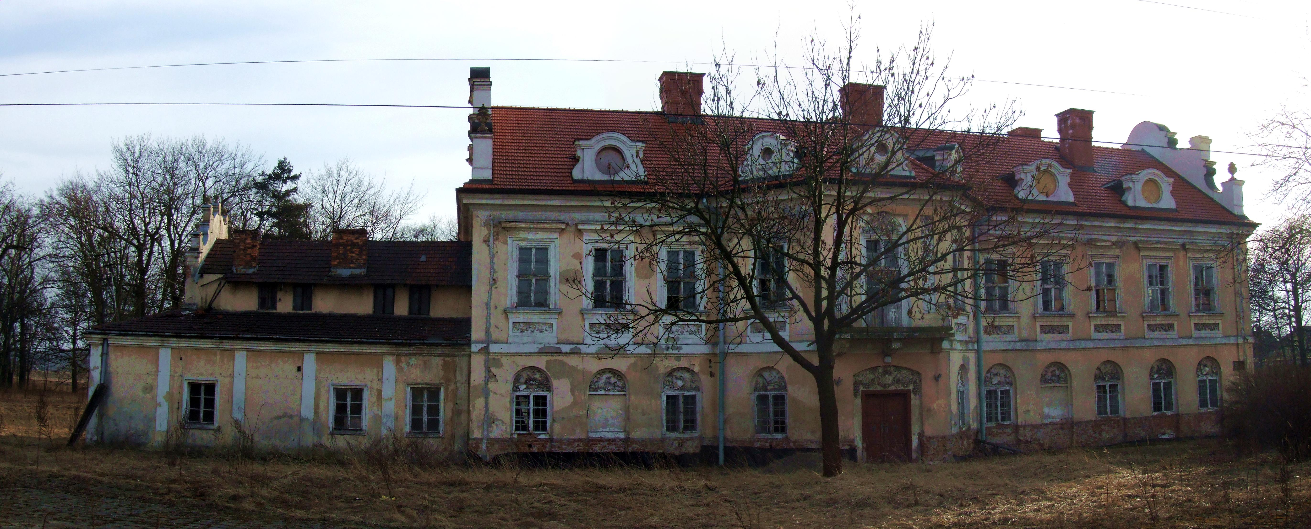 Pałac w Kryspinowie